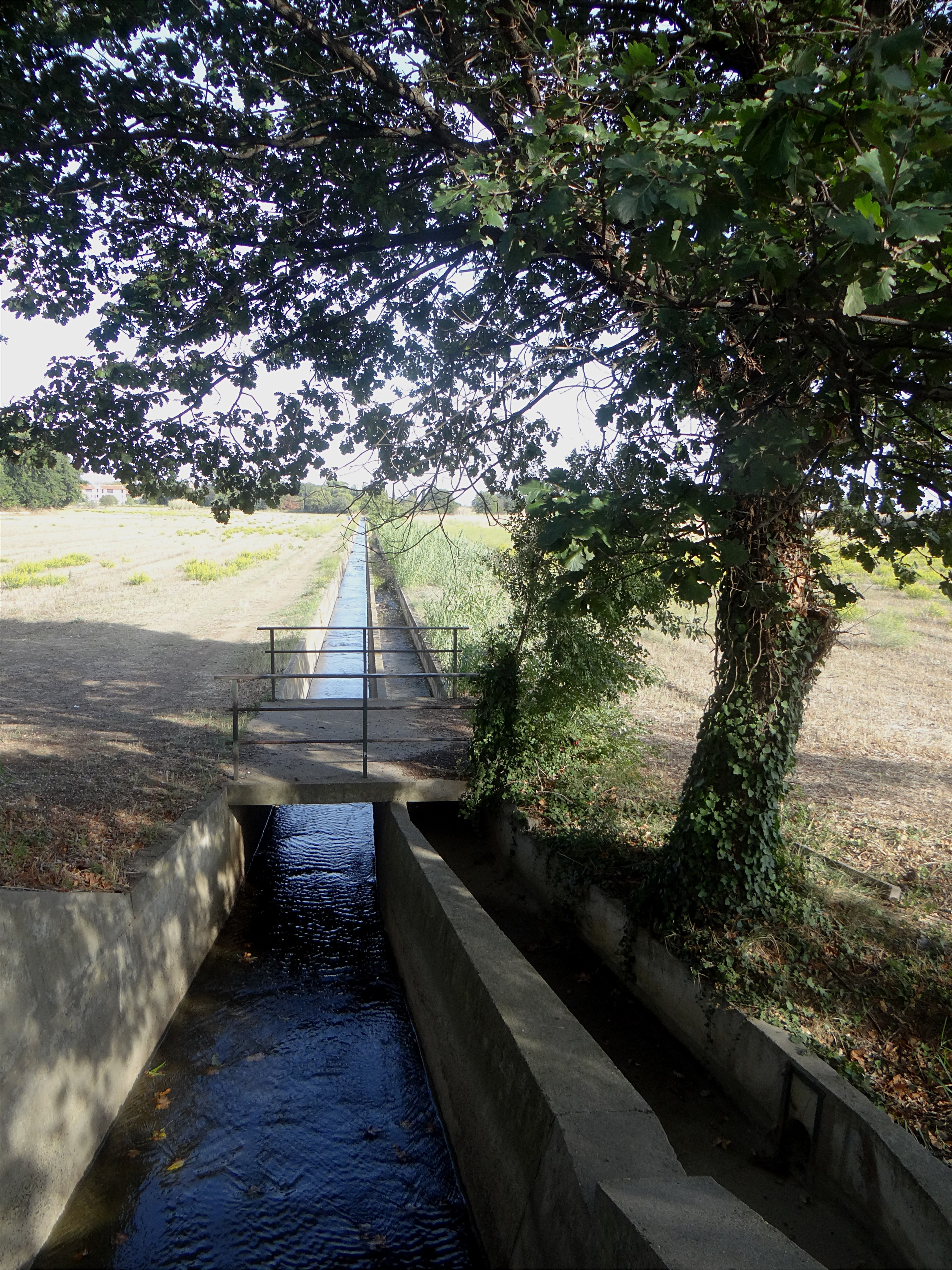 Canal de Perpignan, Perpignan, Pyrénées-Orientales, France. Dérivation de l'Agouille de Fontcouverte (Foncoberta), affluent de la rivière Le Réart.